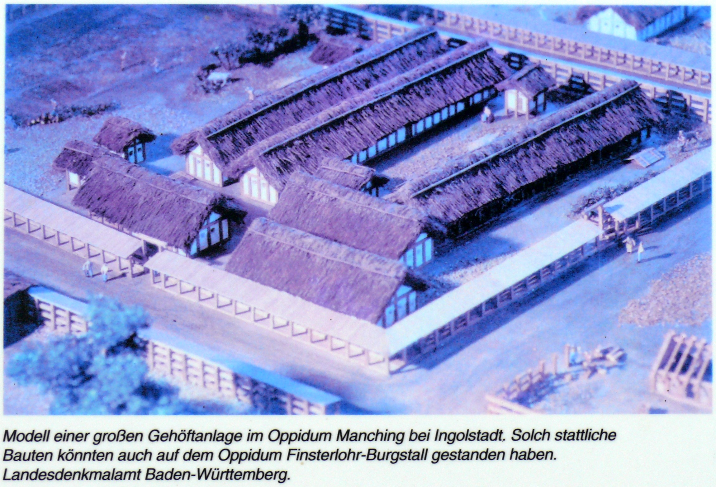 Modell einer keltischen Siedlung (Oppidum) in Manching